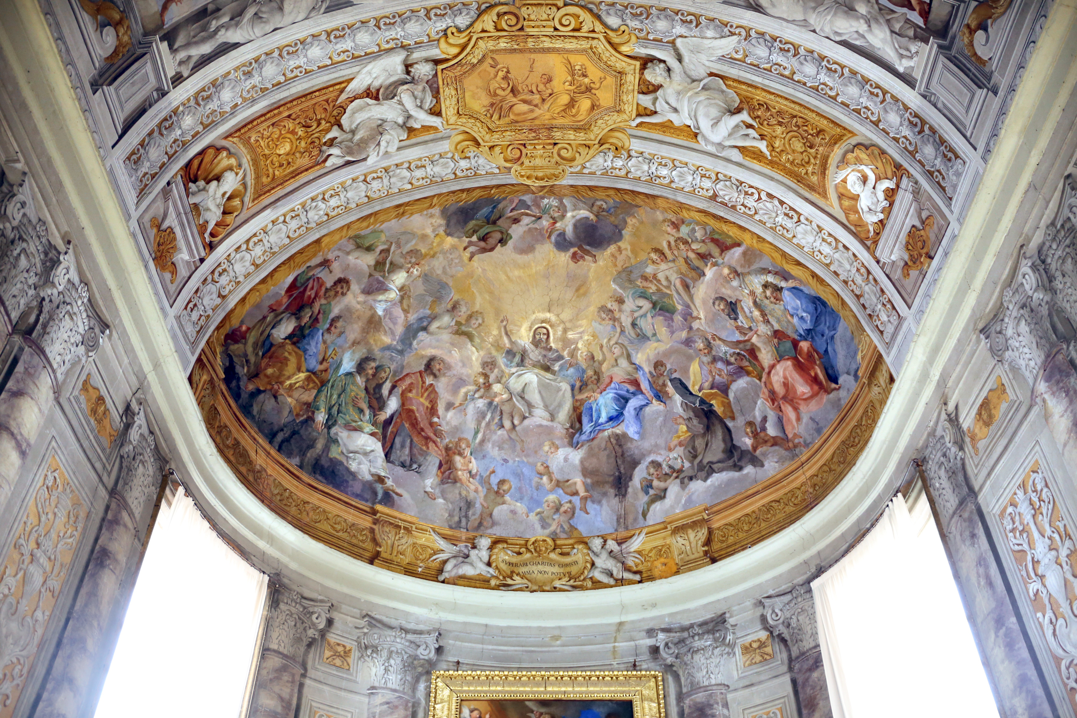 Duomo (Viterbo) This is a photo of a monument which is part of cultural heritage of Italy.